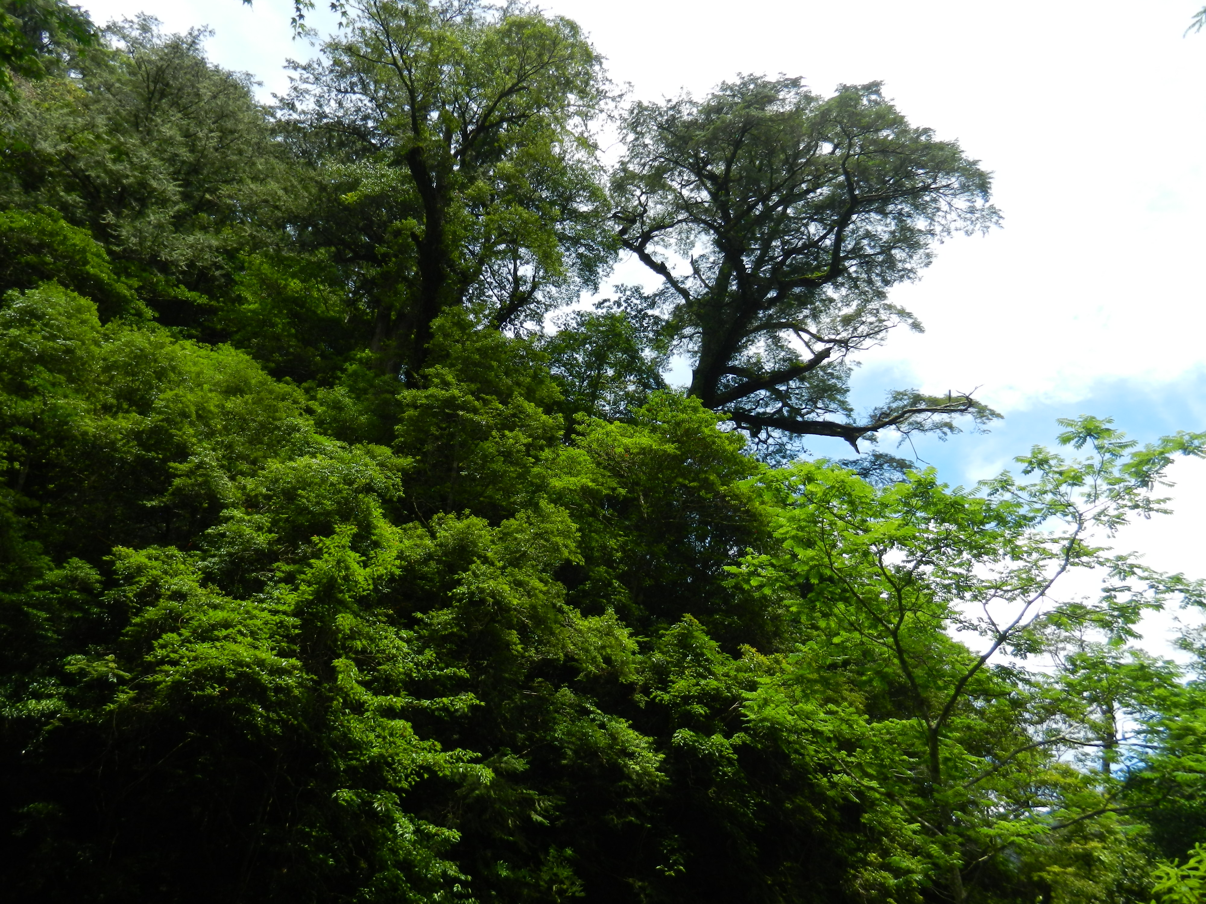 拉拉山 Lalashan